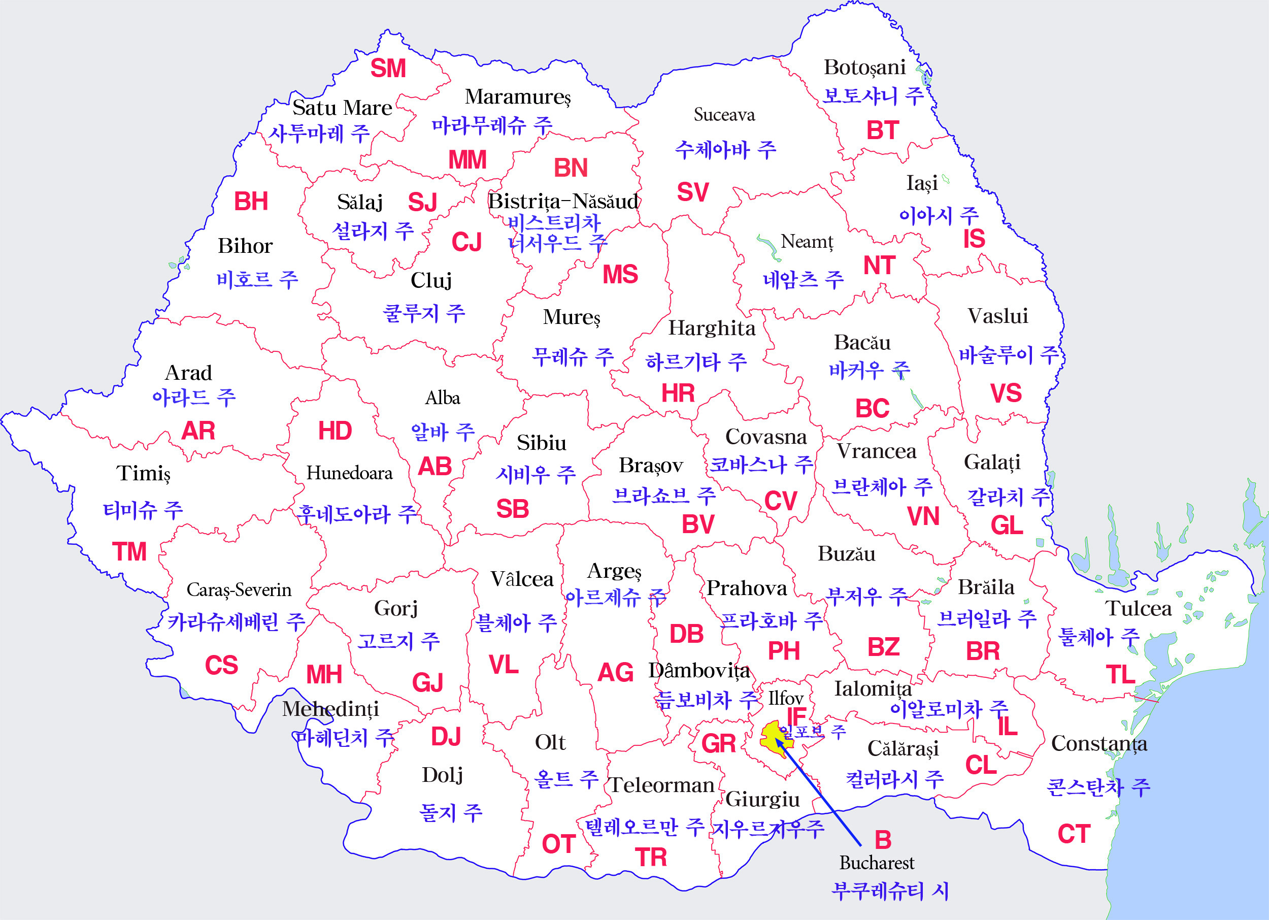 루마니아 행정구역